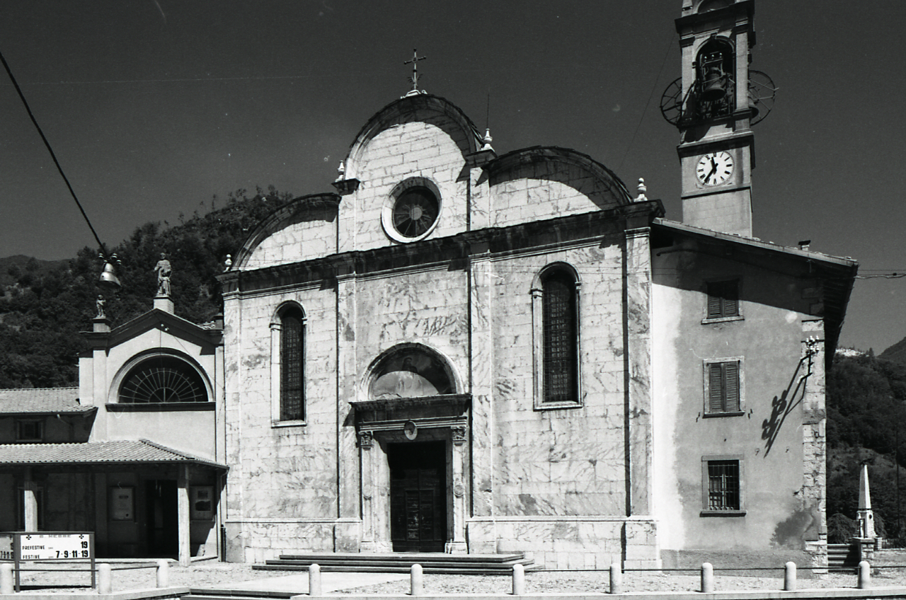 Servizio fotografico : Sedrina, 1977 / Paolo Monti. - Strisce: 4, Fotogrammi complessivi: 24 : Negativo b/n, gelatina bromuro d'argento/ pellicola ; 35 mm. - ((Sul portanegativi: N[I]K[MA]T FP4. - All'interno del portanegativi: la serie è anche identificata da una linea orizzontale a pennarello nero che separa la suddetta serie dalla successiva di soggetto diverso. - Occasione: Pubblicazione (Electa, 1977). - Fonte: Agenda di Paolo Monti: Leica 1501-3000 Controllo numerazione (1950-1978), presso Archivio Paolo Monti. - Fonte: Fattura di Paolo Monti: IV. Commesse/ Fattura n. 05/ Fotografie per volume architetto veneziano Codussi - Prof. Puppi (1977/03/31), presso Archivio Paolo Monti. - Fonte: Monografia di Olivato Loredana, Puppi Lionello: Mauro Codussi, Milano, Electa (1977)